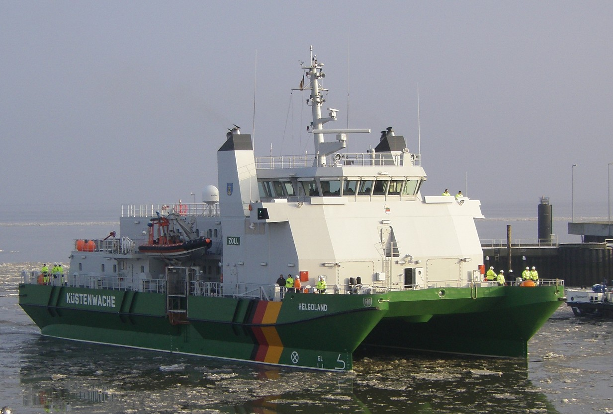 Die Helgoland während des Einlaufens in den Hafen von Cuxhaven